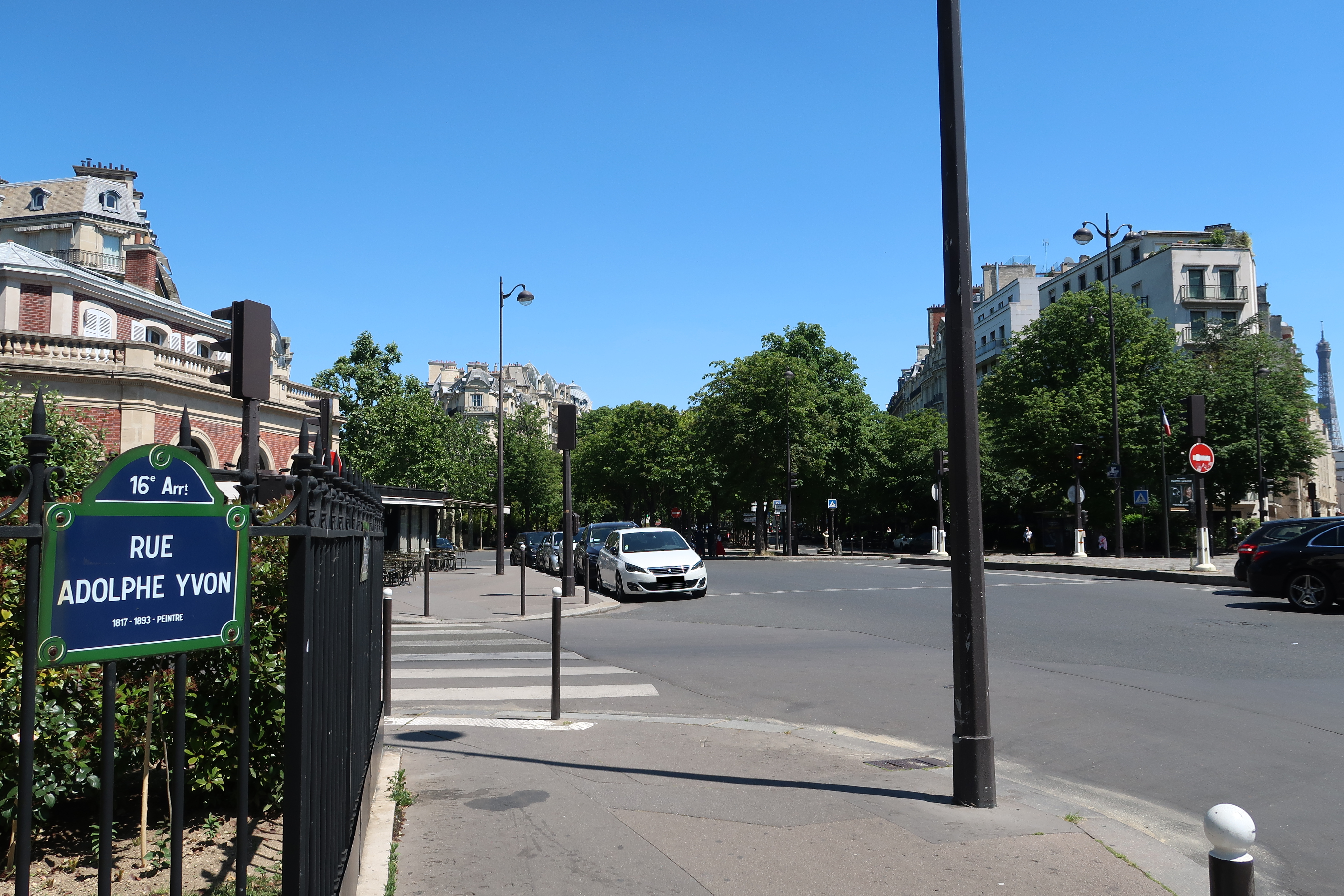 Croisement de la rue Adolphe-Yvon et de la place Tattegrain (Paris, 16e).